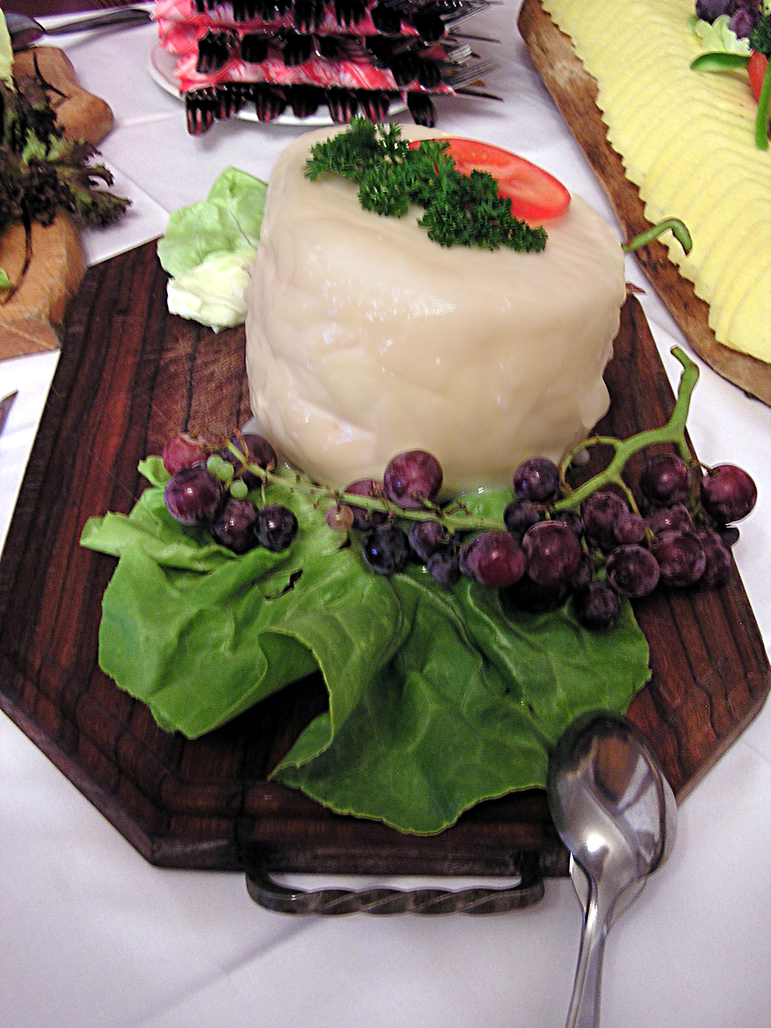 Sura-Kees Ort & Datum: Juli 2006